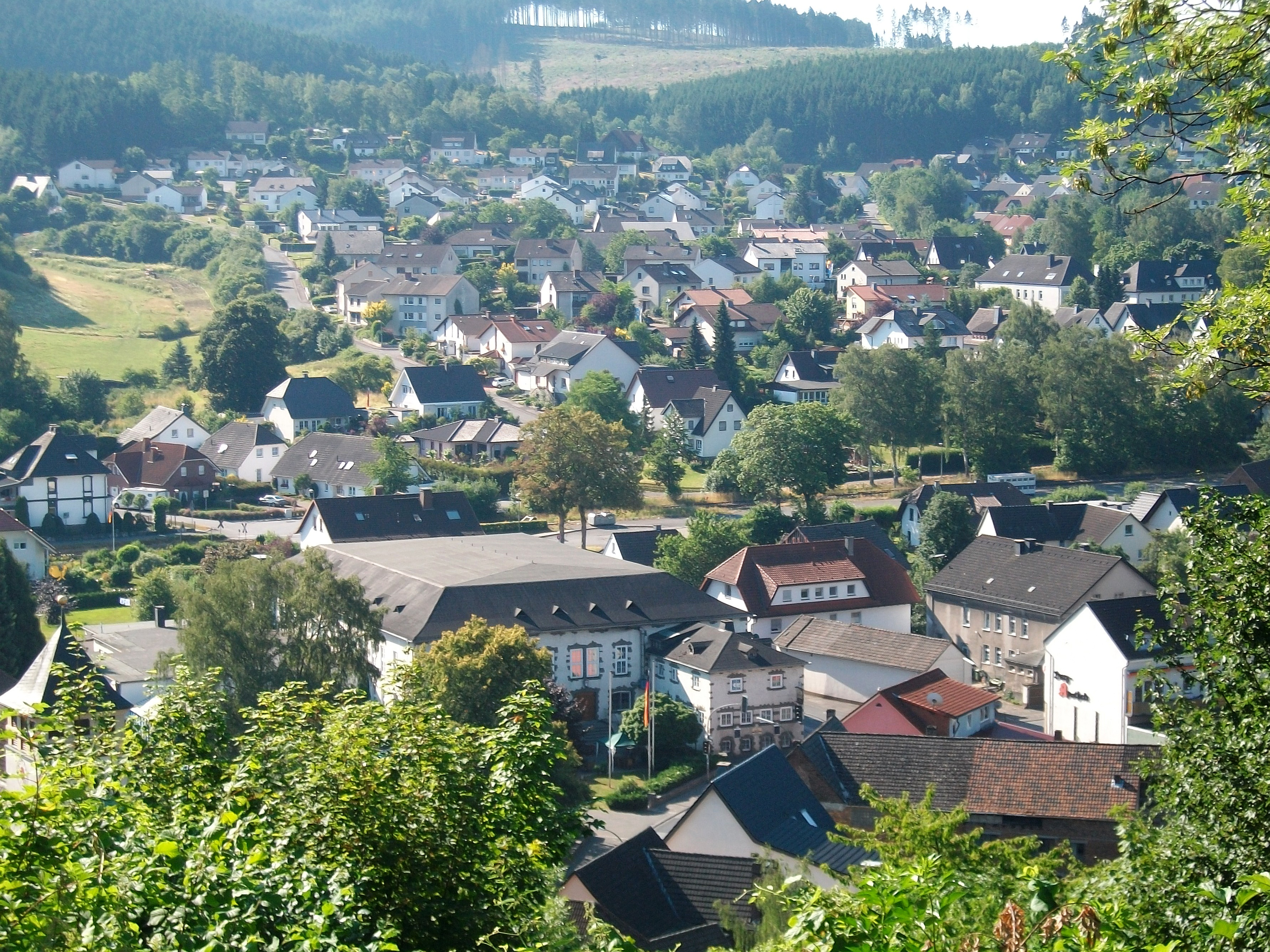 Sundern-Hachen (Germany)